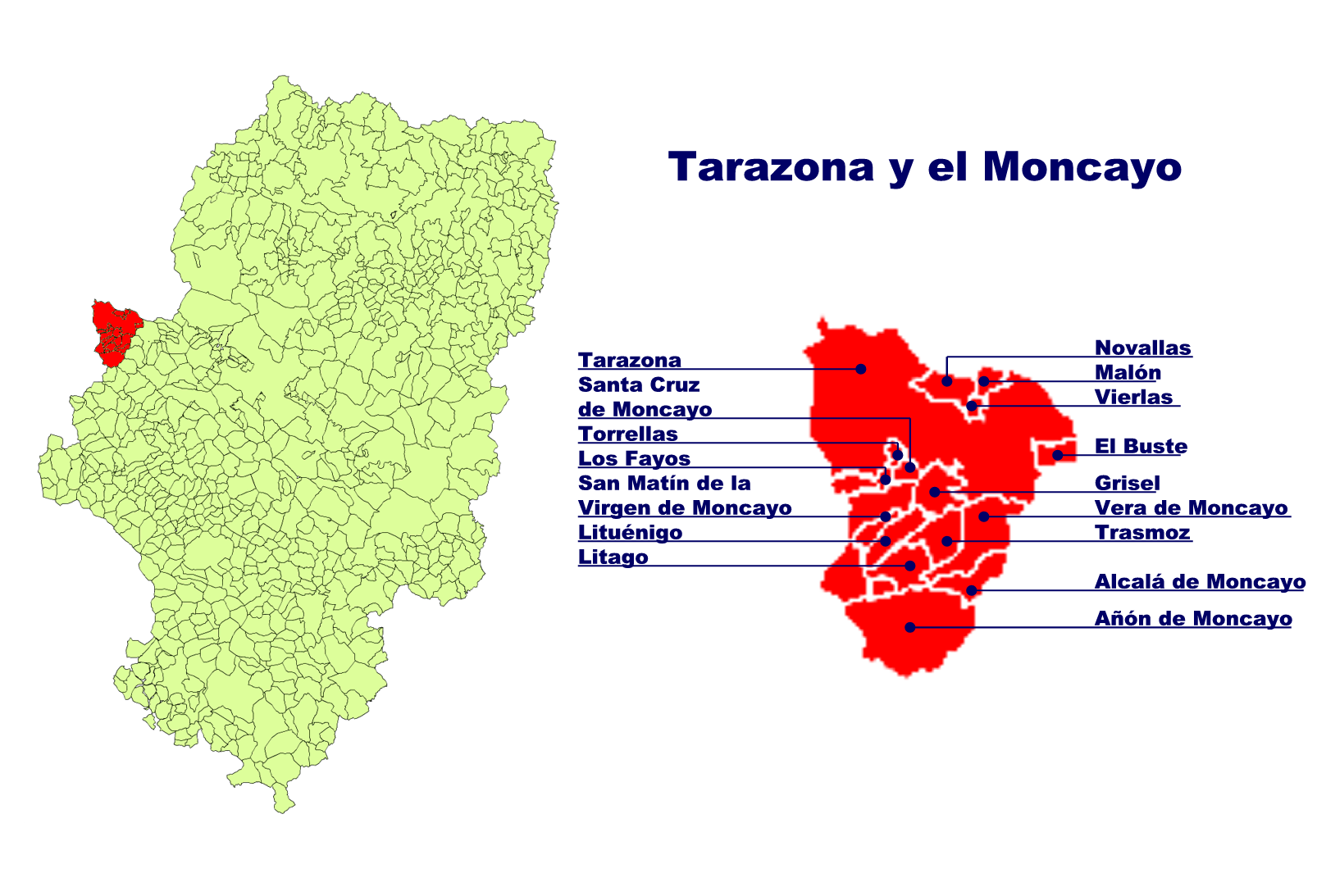 Comarca de Tarazona y el Moncayo Creado el 13.10.2005 por Ecelan en base a Image:Aragon municipalities.png